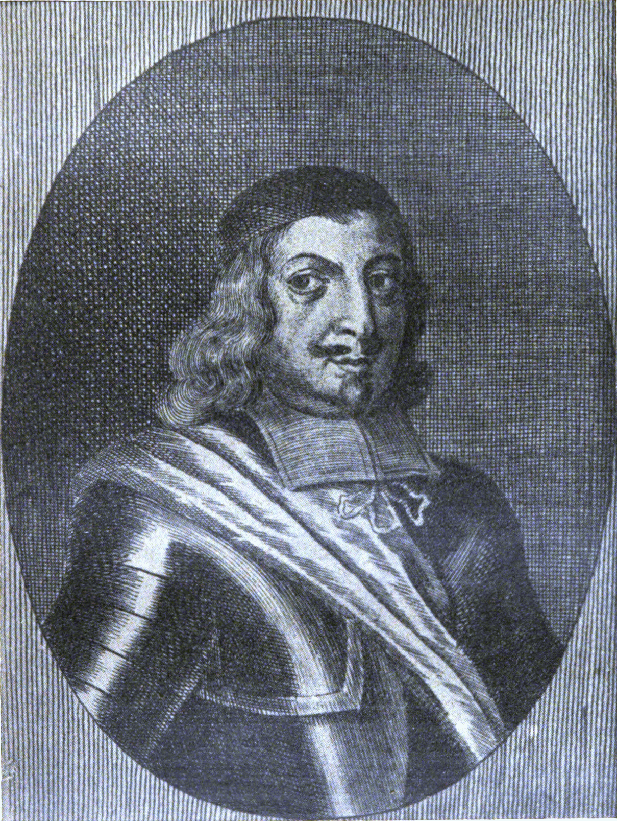 Hans Ungnad von Weissenwolf, Freiherr von Sonneck; (* 1493; † 27. Dezember 1564 auf Schloss Winteritz [Vintířov] in Böhmen), ein österreichischer Staatsmann, der später in Urach (Württemberg) eine Buchdruckerei unterhielt, um die Reformation zu unterstützen